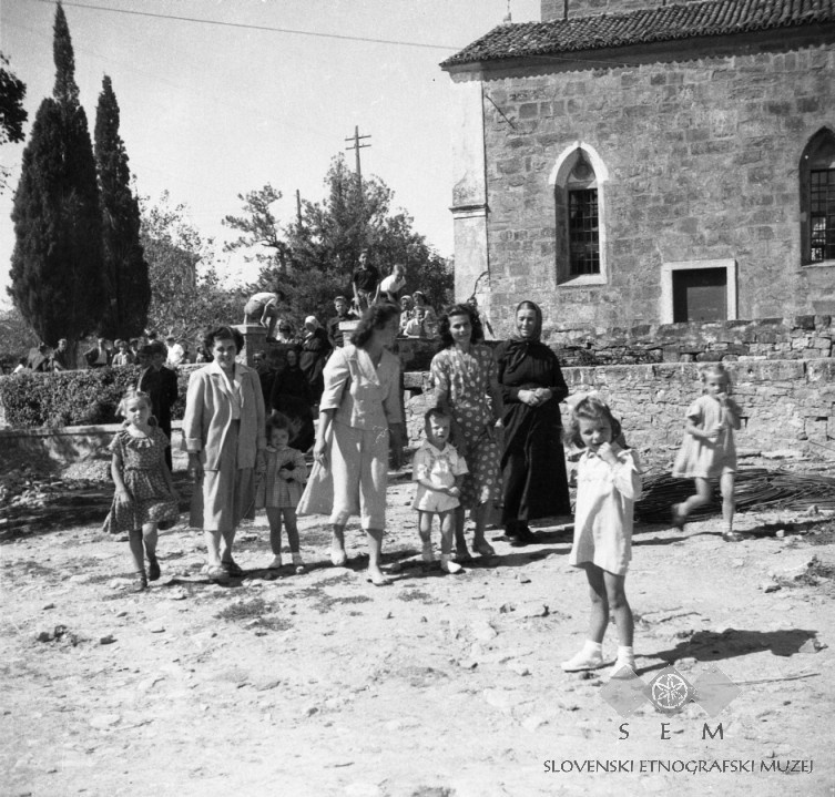 Ljudje gredo od maše, Dekani.